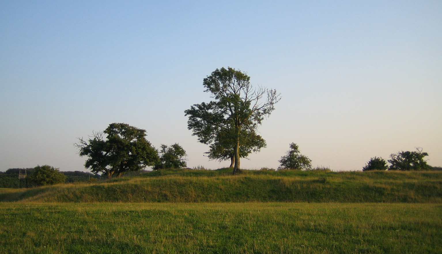 Lindholmens borgruin.